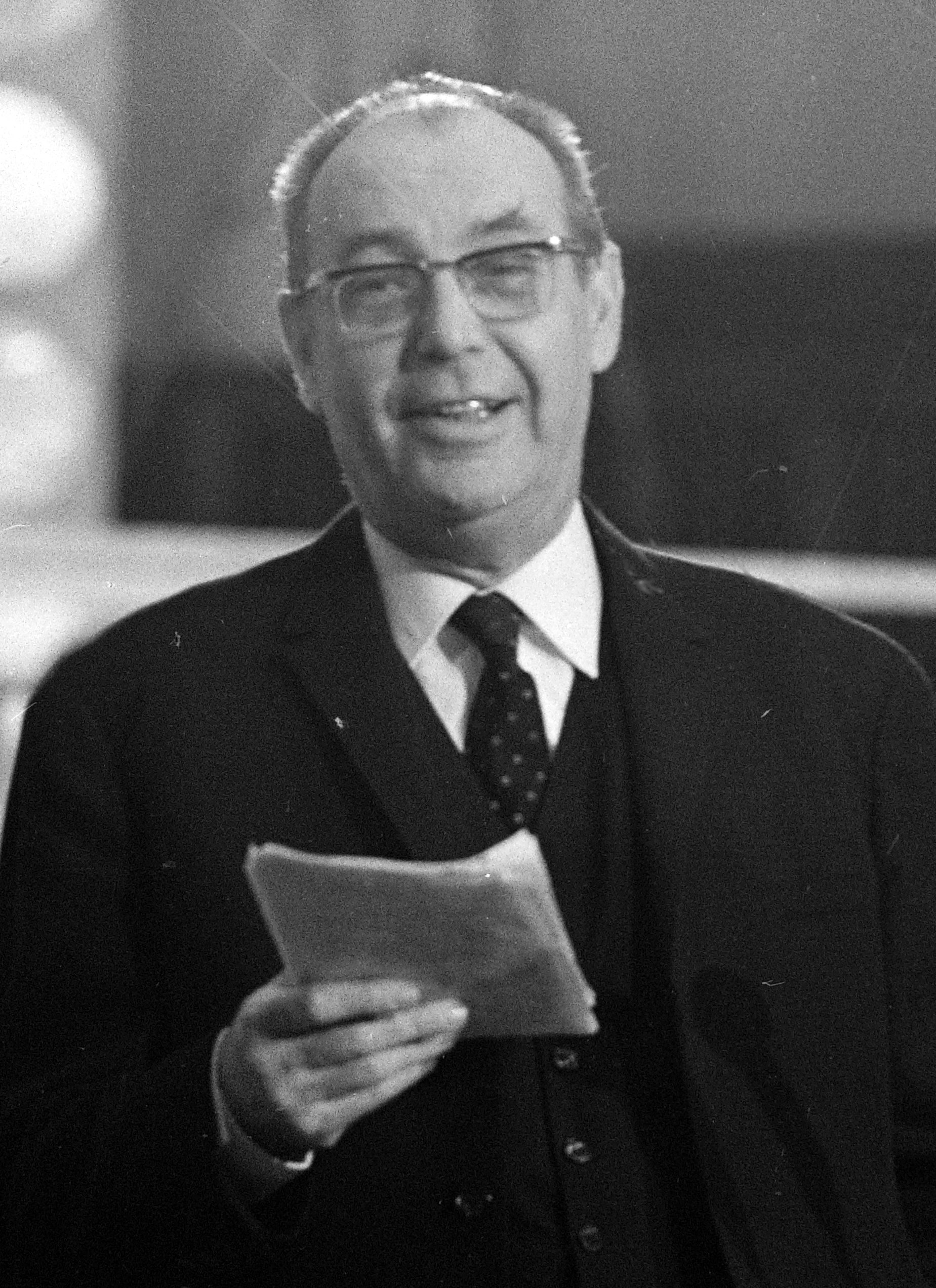 Várkonyi Zoltán magyar színész, filmrendező, színházigazgató.